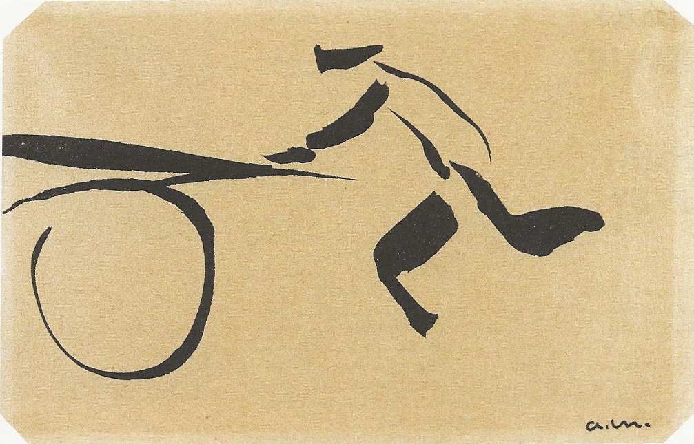 Dessin à l'encre de Chine sur papier, 8 x 12 cm, monogrammé en bas à droite : a. m. - Musée des Beaux-Arts de Bordeaux (Inv. Bx 1960.5.14).